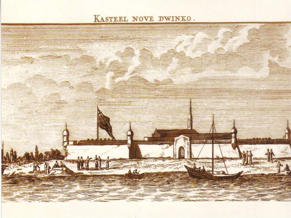 Kasteel nove dwinko. Новодвинская крепость. Гравюра из книги художника-путешественника Корнелиуса де Брюйна «Путешествие через Московию», Амстердам, 1711